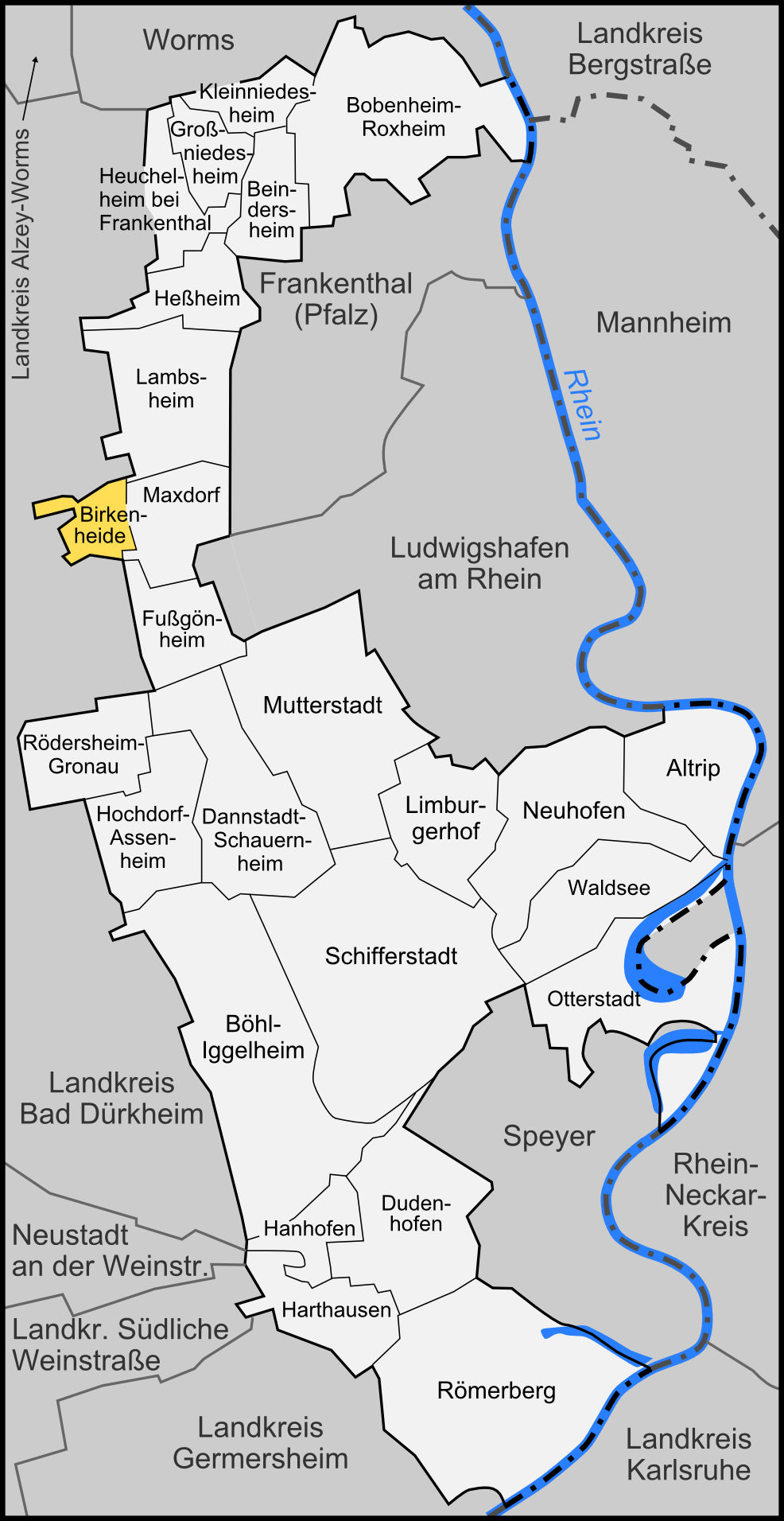 Karte der Gemeinde Birkenheide im Rhein-Pfalz-Kreis